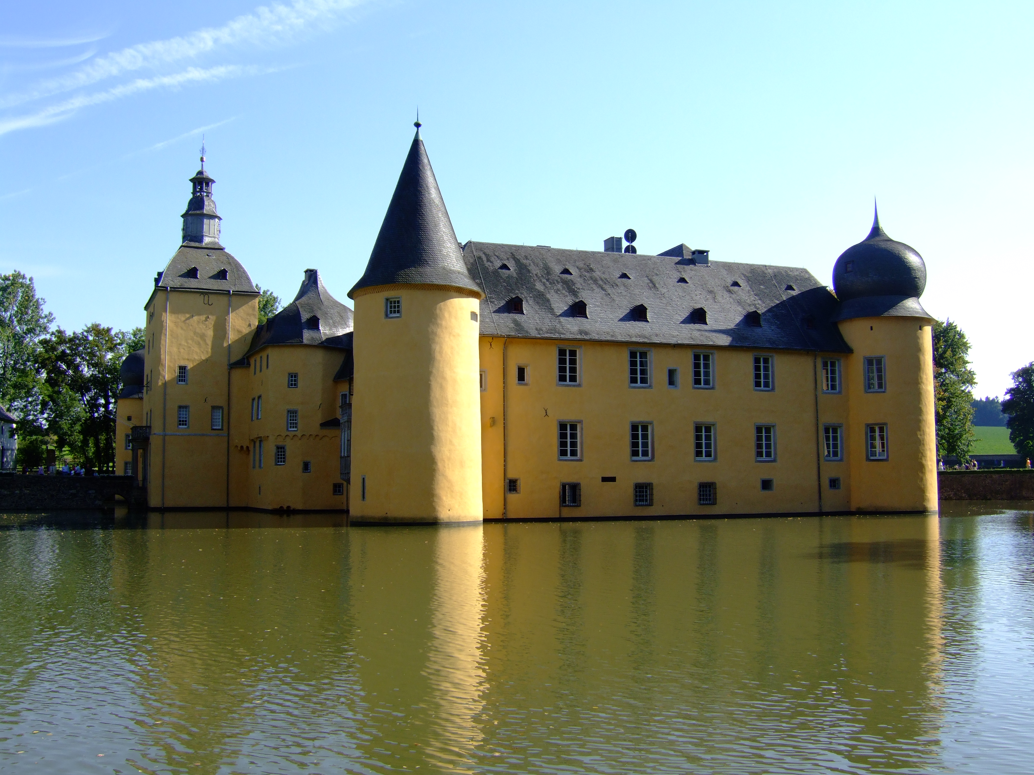 Burg Gudenau am Tag des offenen Denkmals 2006